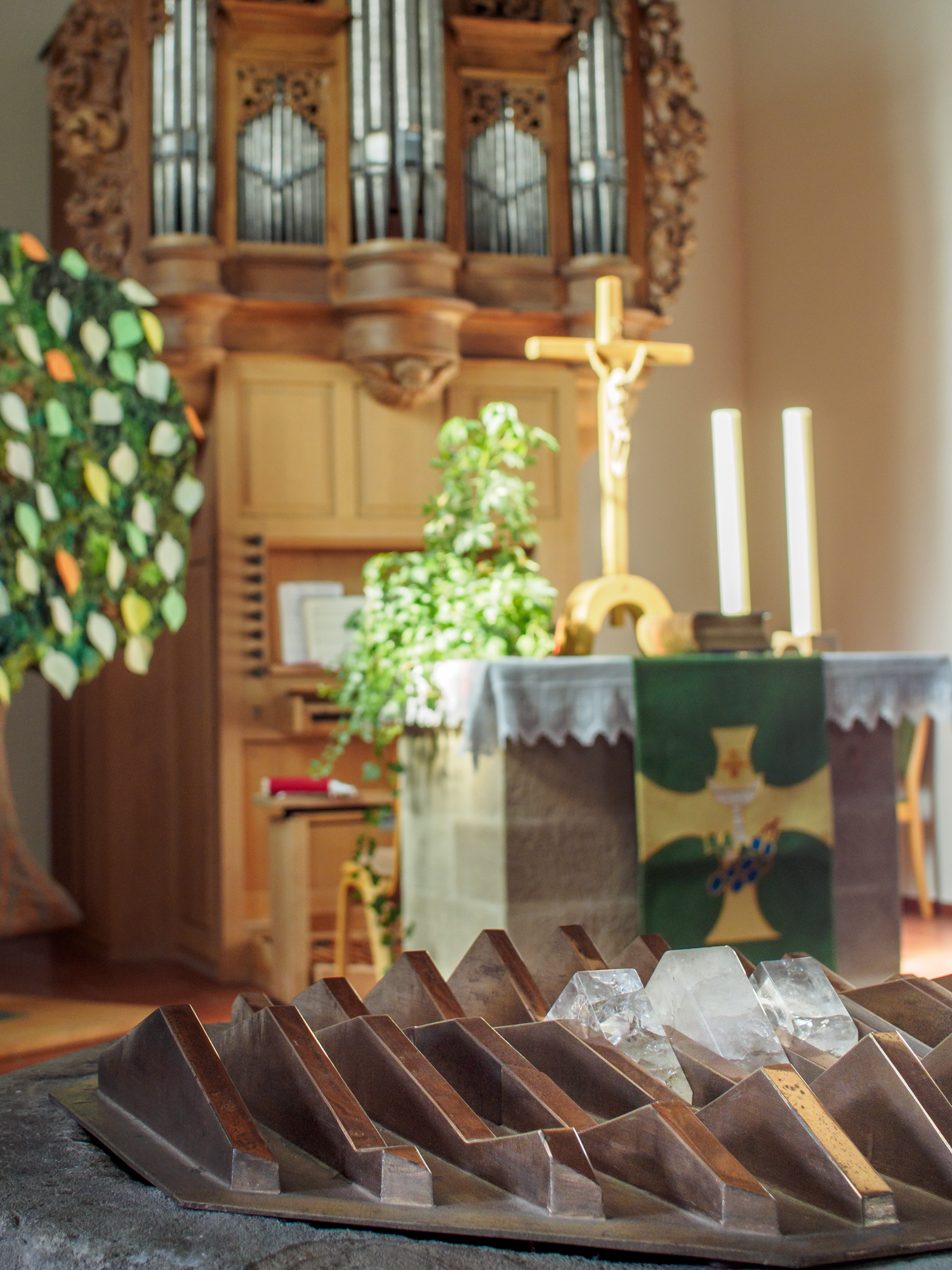 Altar Evangelische Kirche Hottenbach